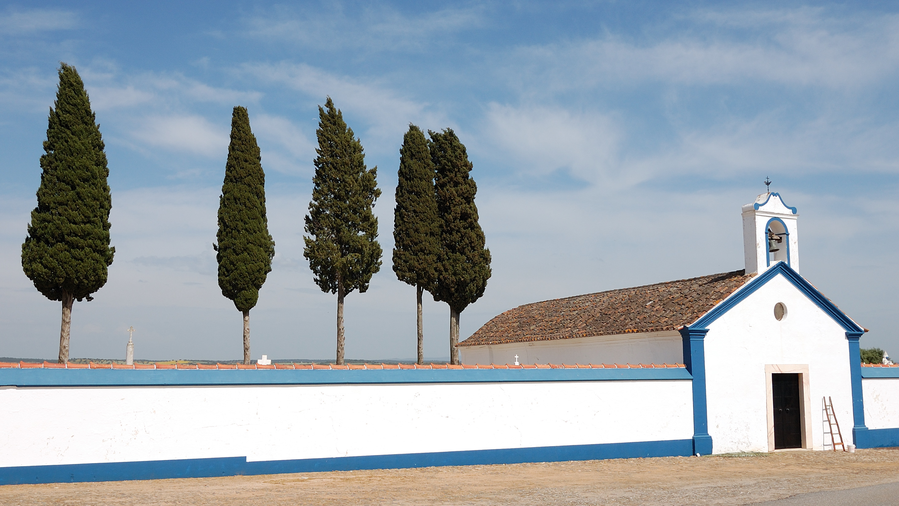 Terena, Portugal [2011]